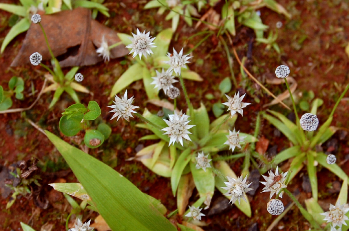 Inflorescence of Eriocaulon stellulatum from Eriocaulaceae.